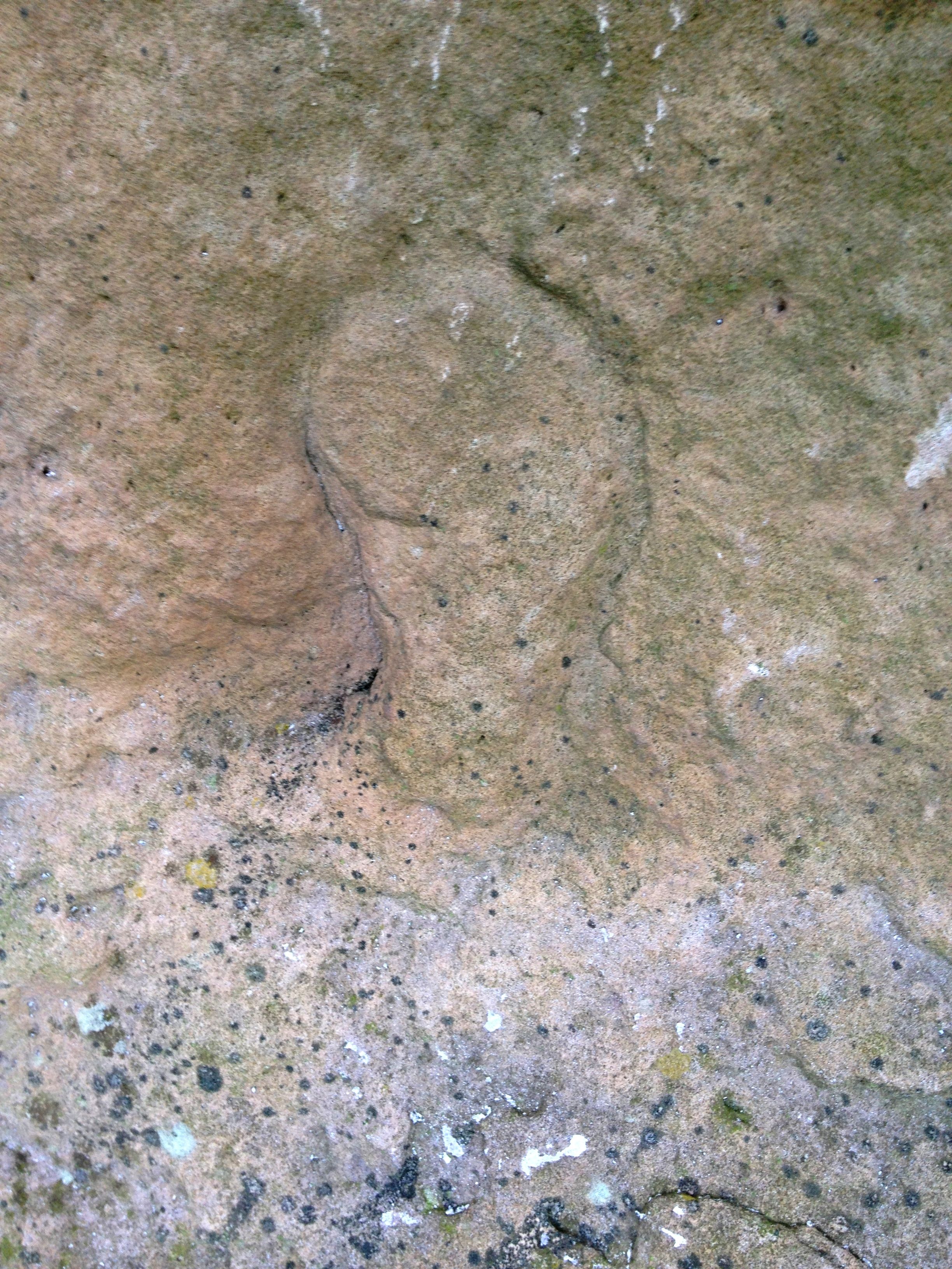 Galeriegrab Bredelem, Stein 7, "Fuß"-Einkerbung